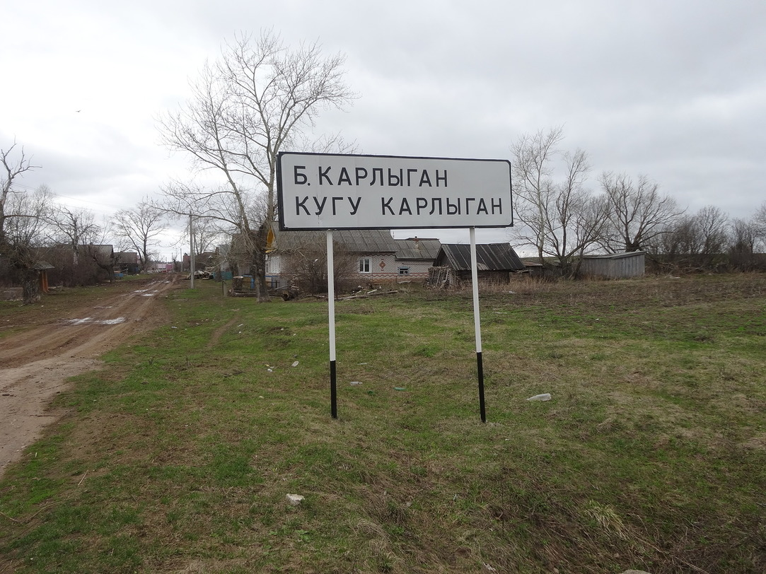 Удмурт: Дорожный знак